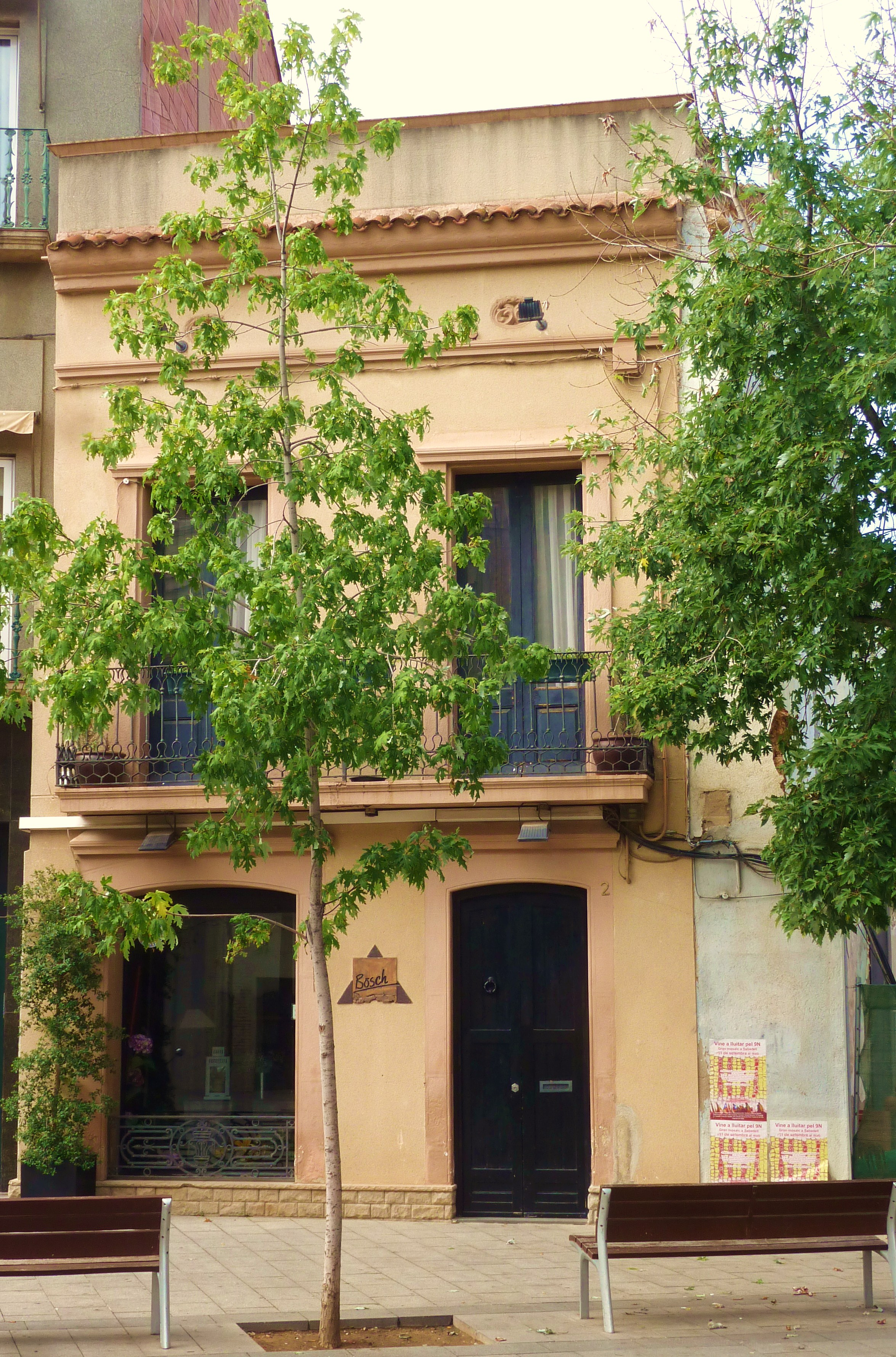 Maison natale du peintre catalan Xavier Oriach à Sabadell en Catalogne. 2014.